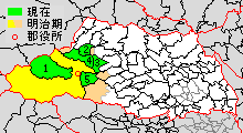 秩父郡の範囲：緑色は現在の範囲（1 小鹿野町、2 長瀞町、3 東秩父村、4 皆野町、5 横瀬町）、黄色は明治中期の範囲（黄色が薄い部分はその後、他郡へ編入）